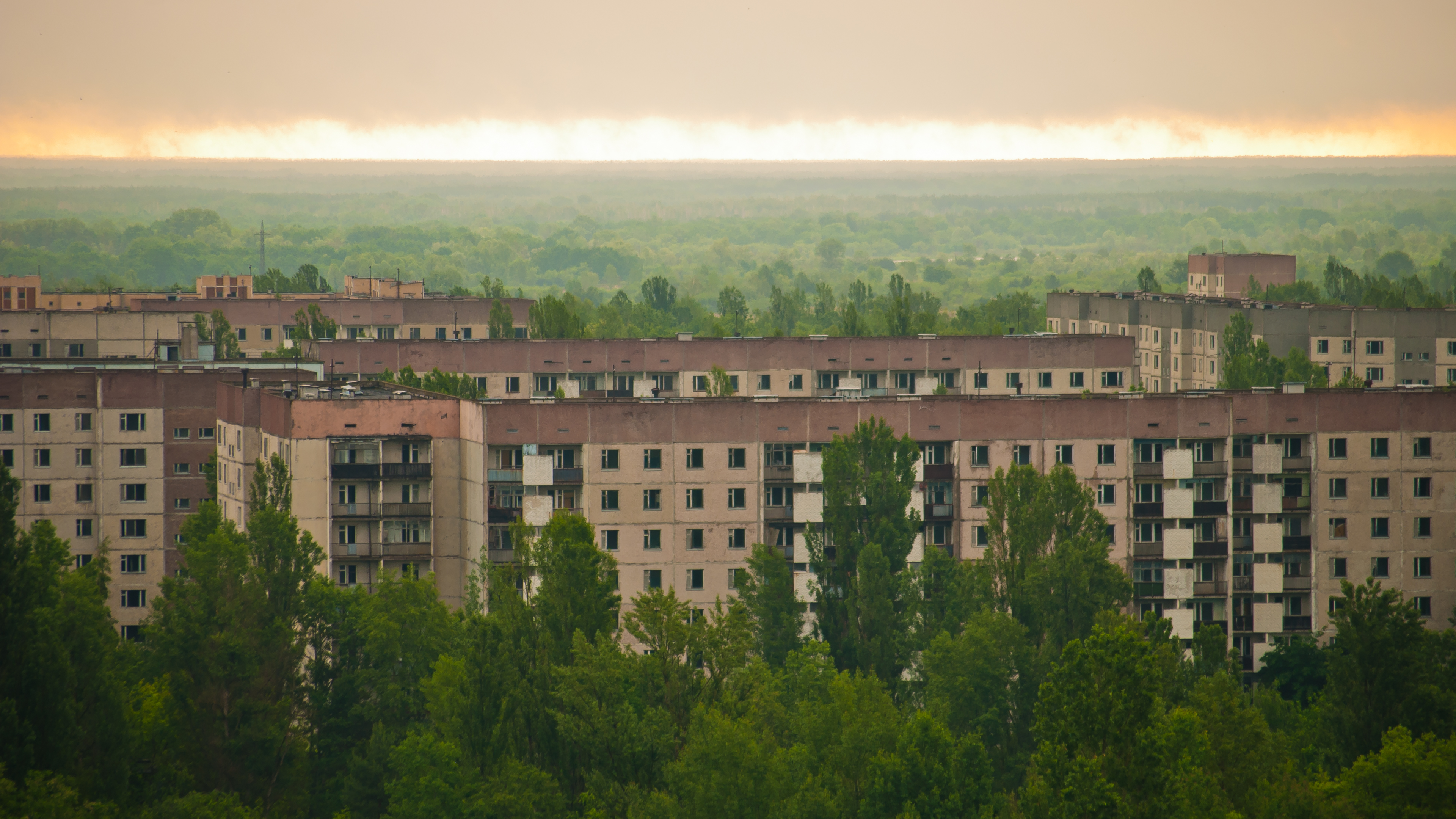 Чорнобильський радіаційно-екологічний біосферний заповідник, Іванківський район, Поліський район, в межах зони відчуження і зони безумовного (обов'язкового) відселення території, що зазнала радіоактивного забруднення внаслідок Чорнобильської катастрофи